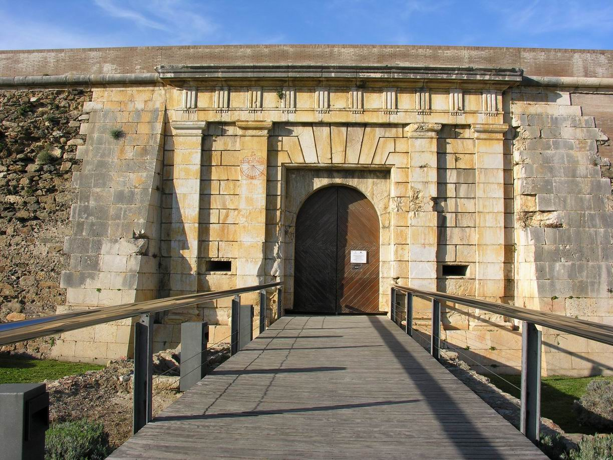 Porta de Mar de la Ciutadella de Roses (Alt Empordà)